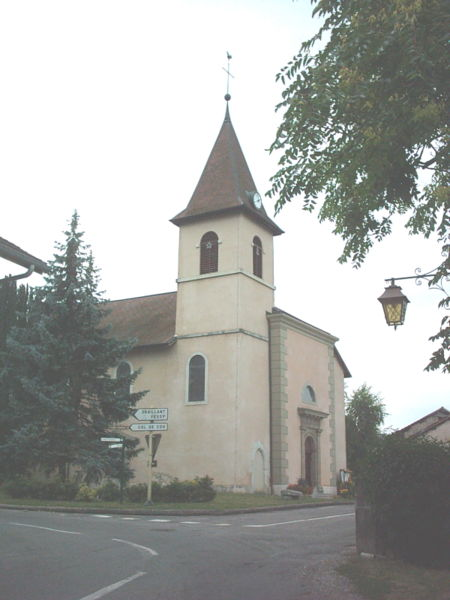 Photo personnelle de l'église Saint-Étienne de Cervens (Haute-Savoie, France)